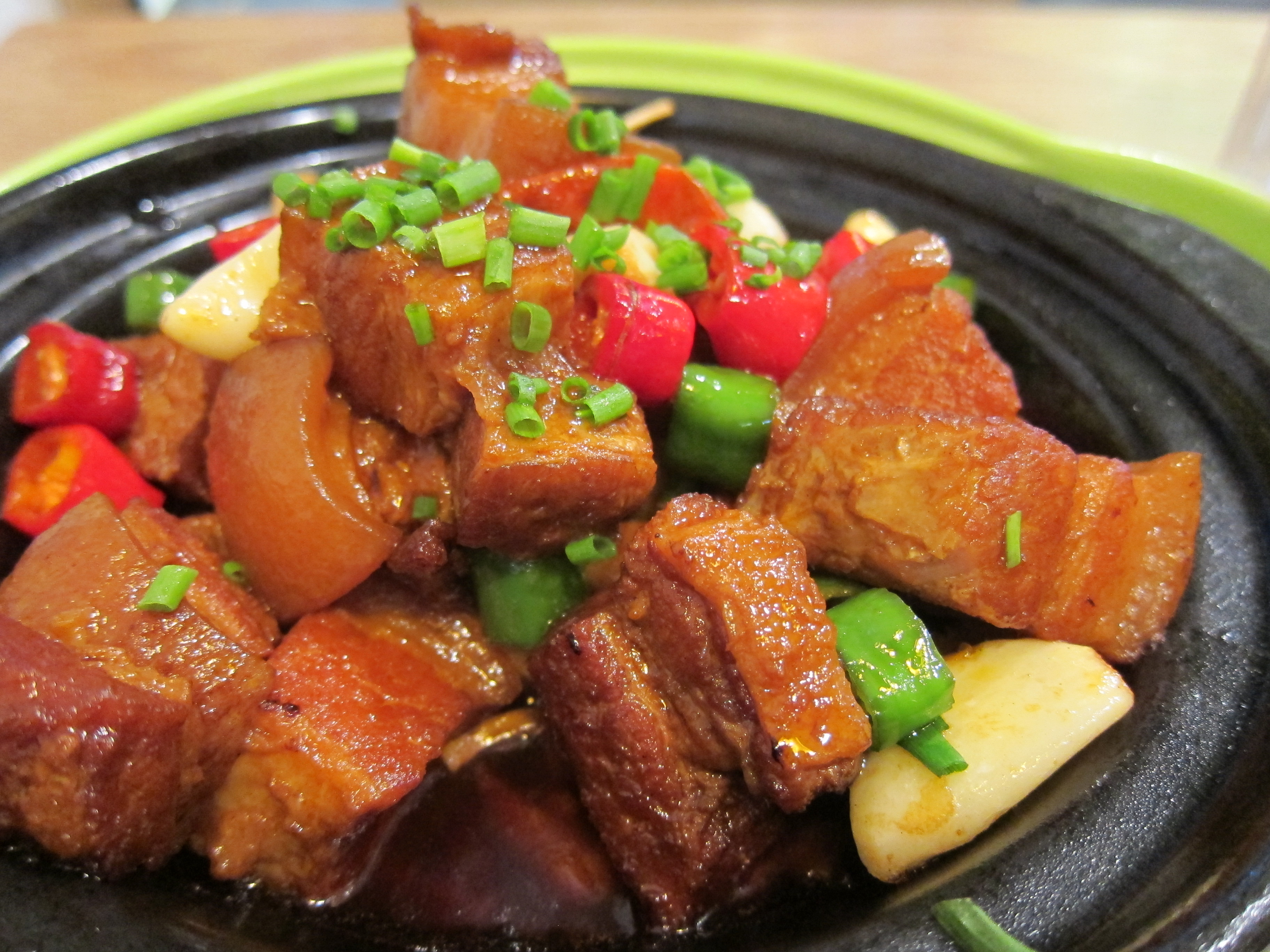 毛氏紅焼肉。辛さ控えめの豚の角煮。